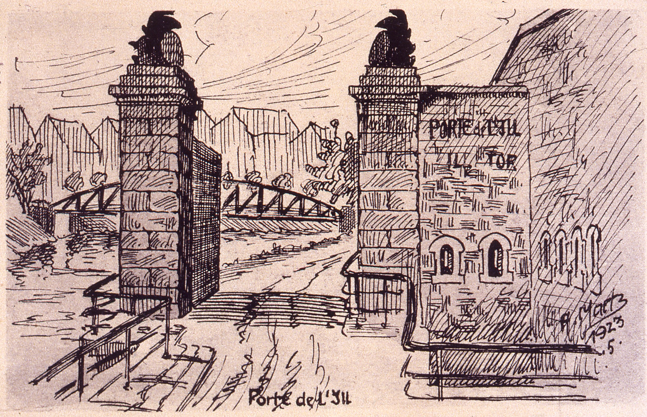 Dessin de la Porte de l'Ill de Strasbourg